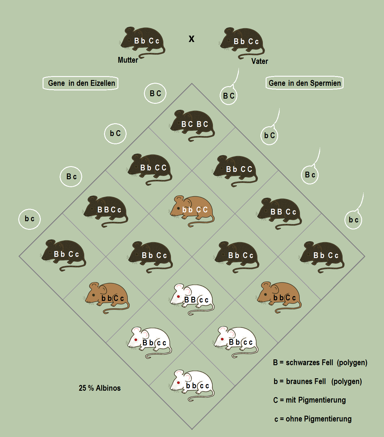 Epistase